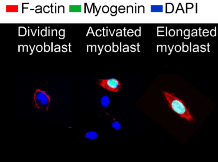 Figura 2. Los mioblastos en diferenciación tienen diferentes niveles de expresión de Barx2. (A). Los mioblastos primarios cultivados fueron inducidos a diferenciarse y se monitorearon los cambios en: la forma celular, la remodelación de actina y la expresión de miogenina.